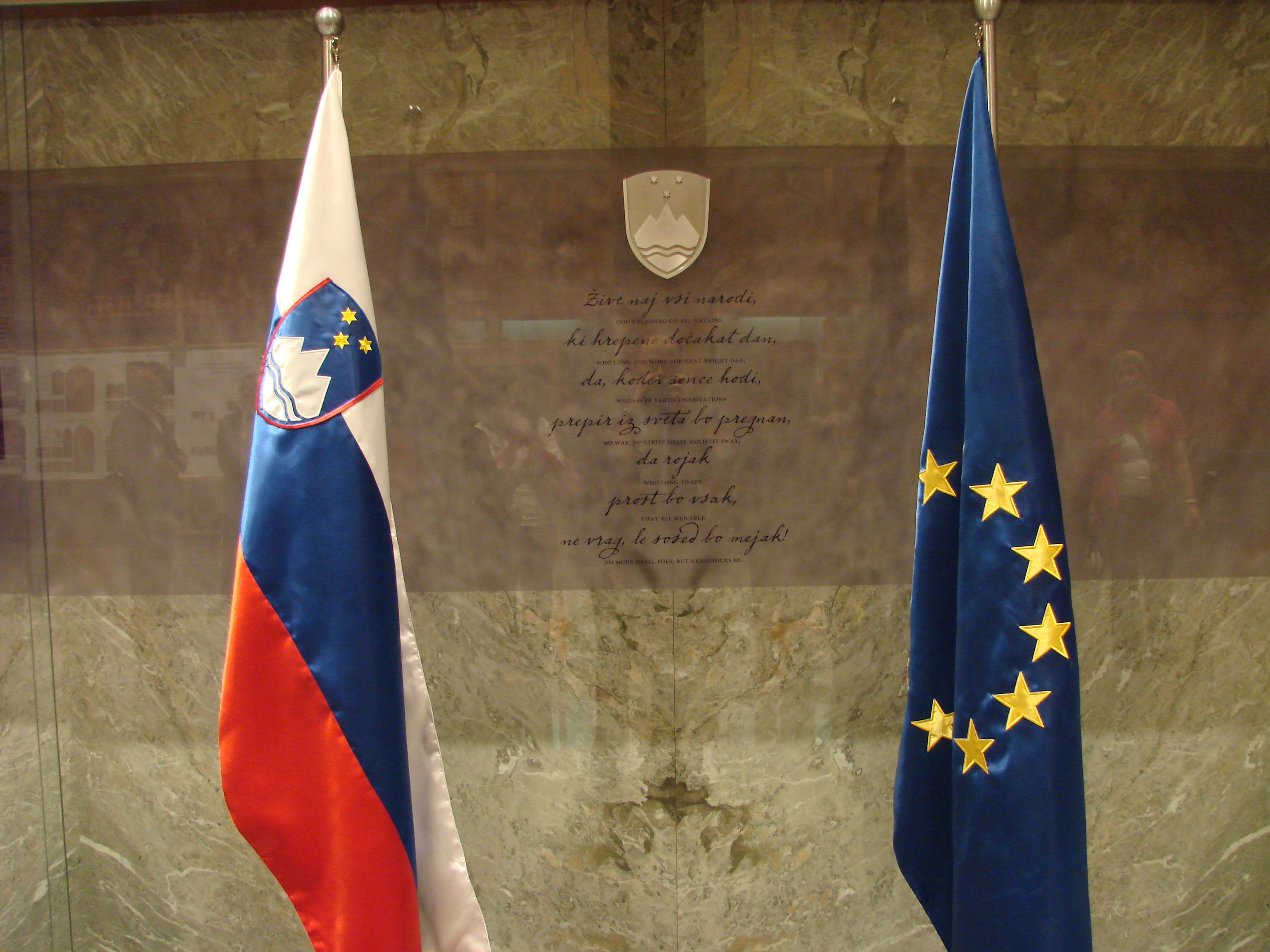 Slovenska himna v avli Državnega zbora RS